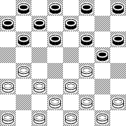 Позиция отказанного и обратного косяка. После хода черными шашкой d6 на с5 или е5 - отказанный косяк. Если 3...fe5 - обратный косяк